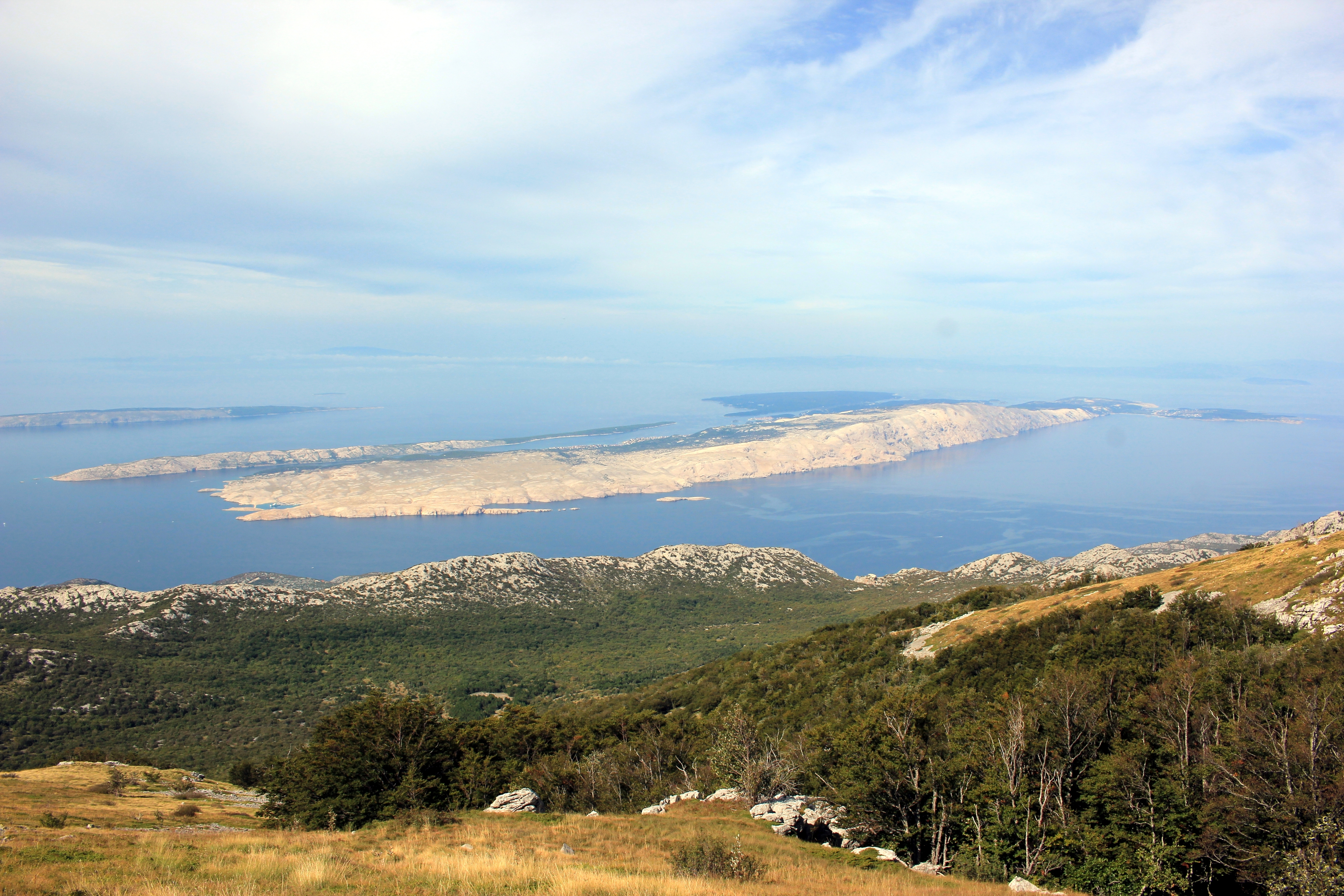 Ansicht der Insel Rab vom Velebit.